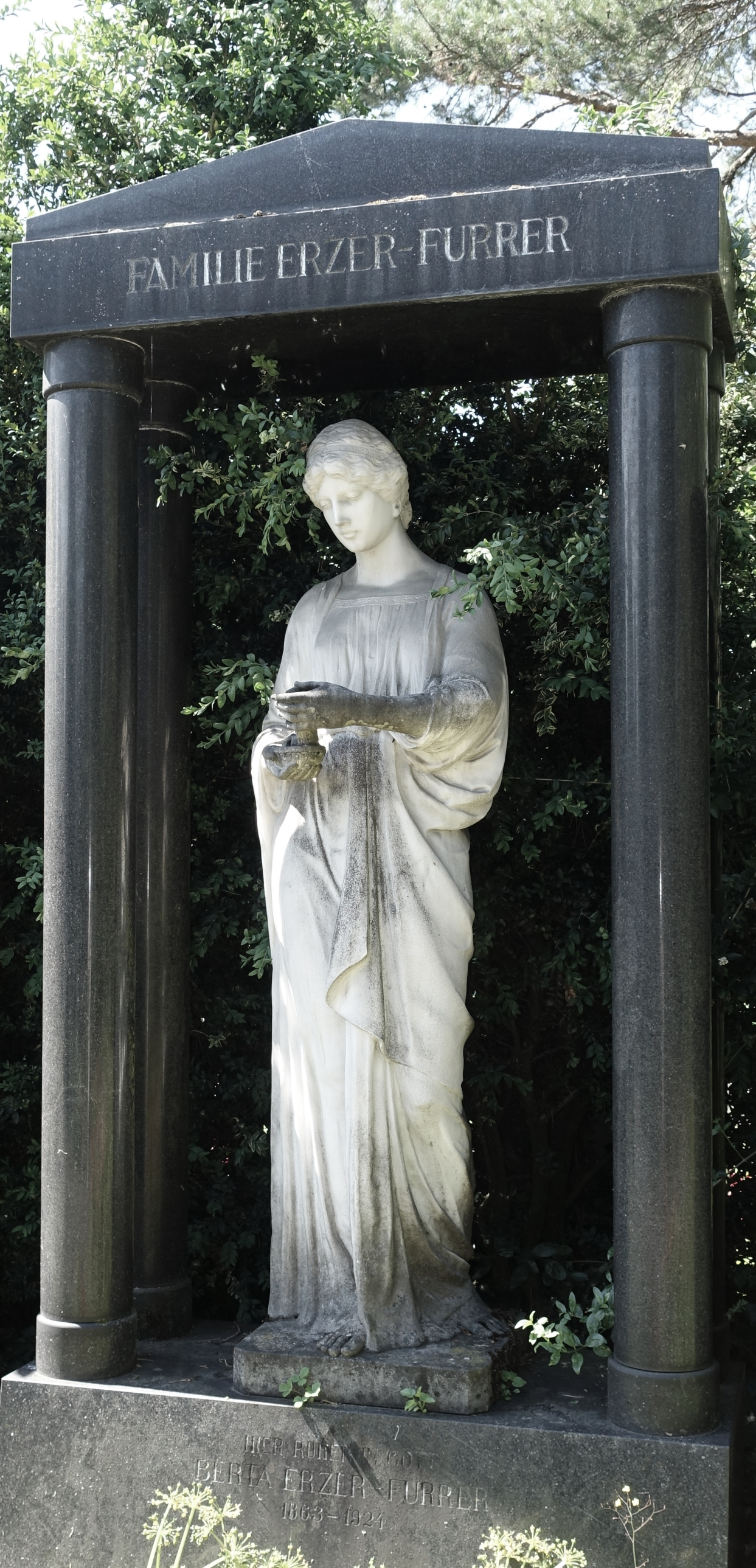 Otto Erzer-Furrer (1860–1941) Ingenieur, Gründer der Papierfabrik in Utzenstorf BE. Bertha Furrer-Erzer (1863–1924) Grab auf dem Friedhof Wolfgottesacker, Basel 1913 gründete Otto Erzer die Papierfabrik Zwingen und 1928 gründete er zusammen mit Conzett & Huber und Birkhäuser Basel eine neue Papierfabrik mit Sitz in Laufen die Kunz Erzer & Co.